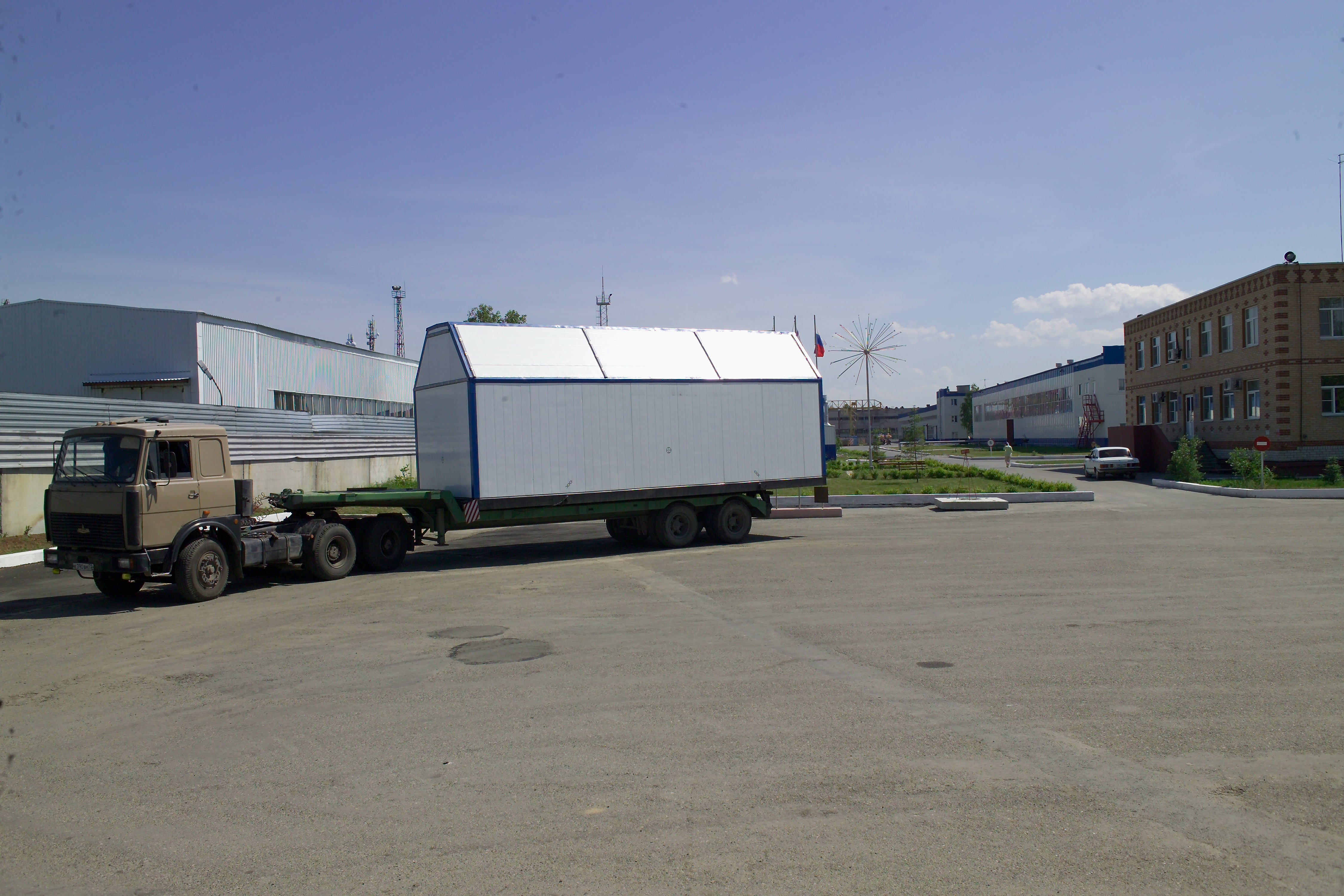 Водопад (станция водоподготовки) производства Экспериментального завода ООО «ТюменНИИгипрогаз».